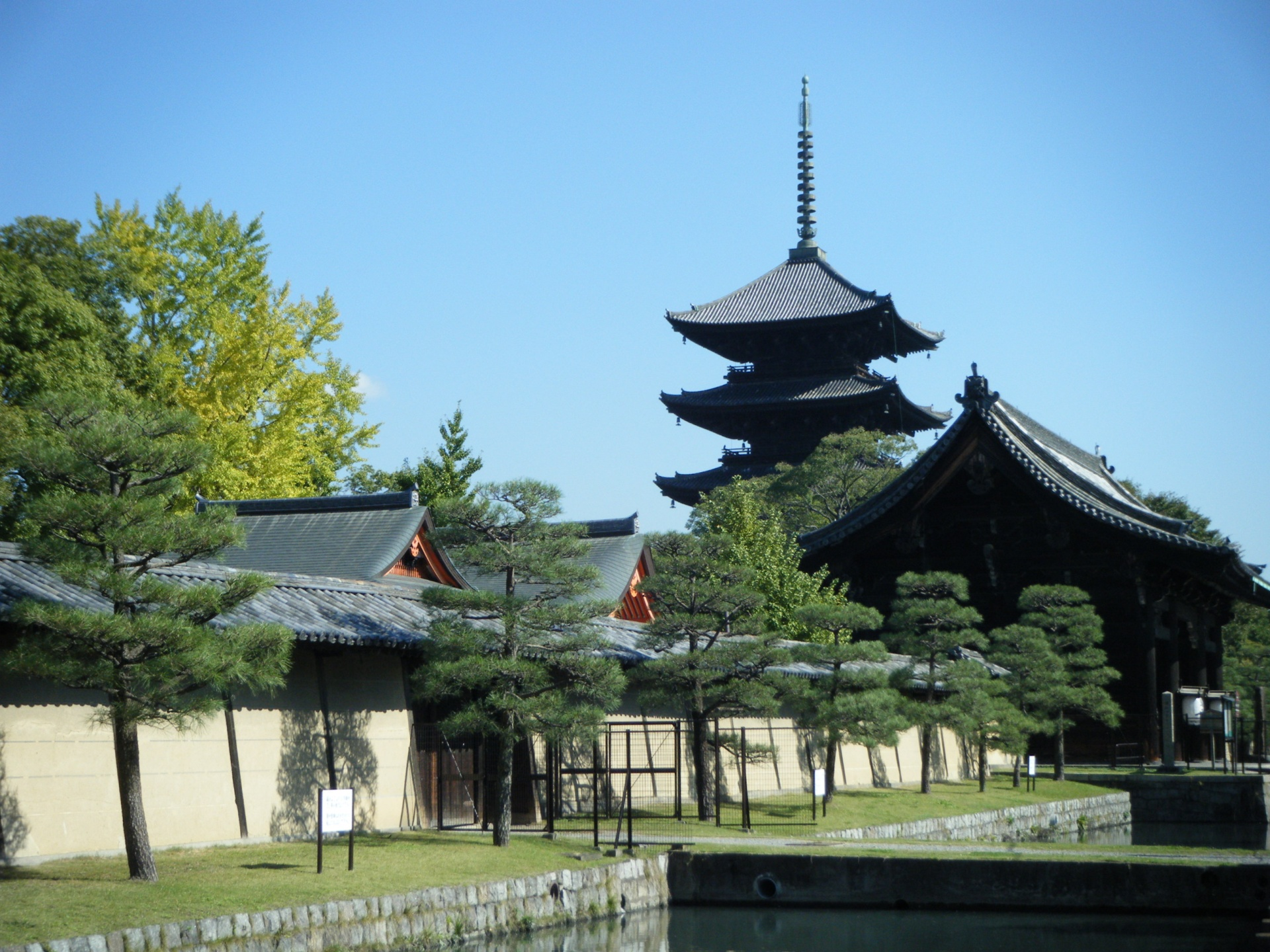 Toji temple, Kyoto